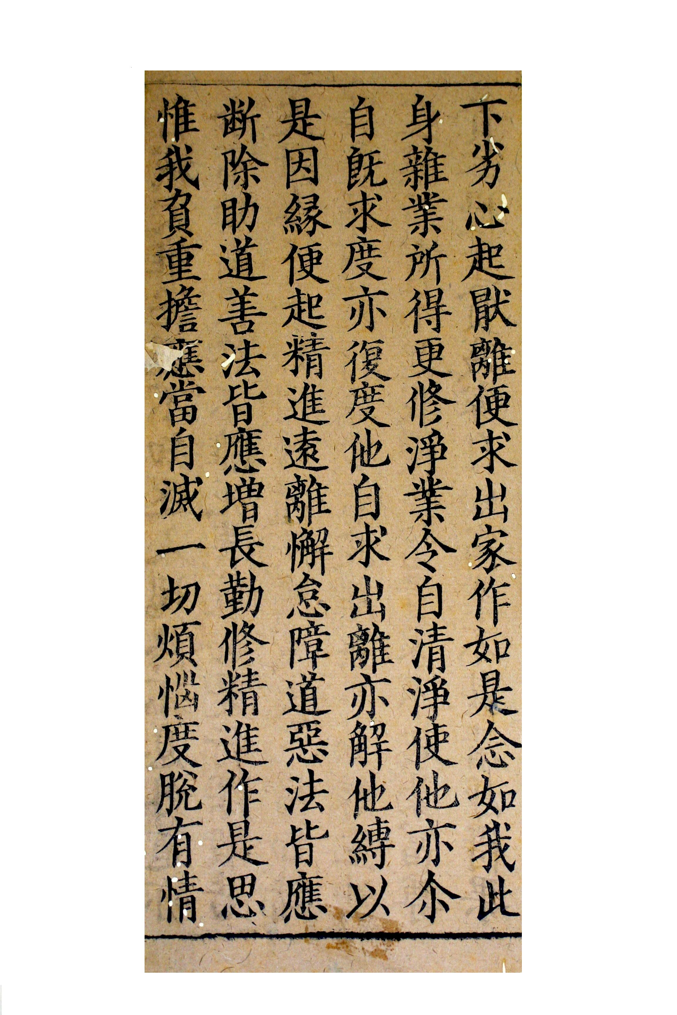 Copia di un sutra del Canone cinese risalente alla Dinastia Song.